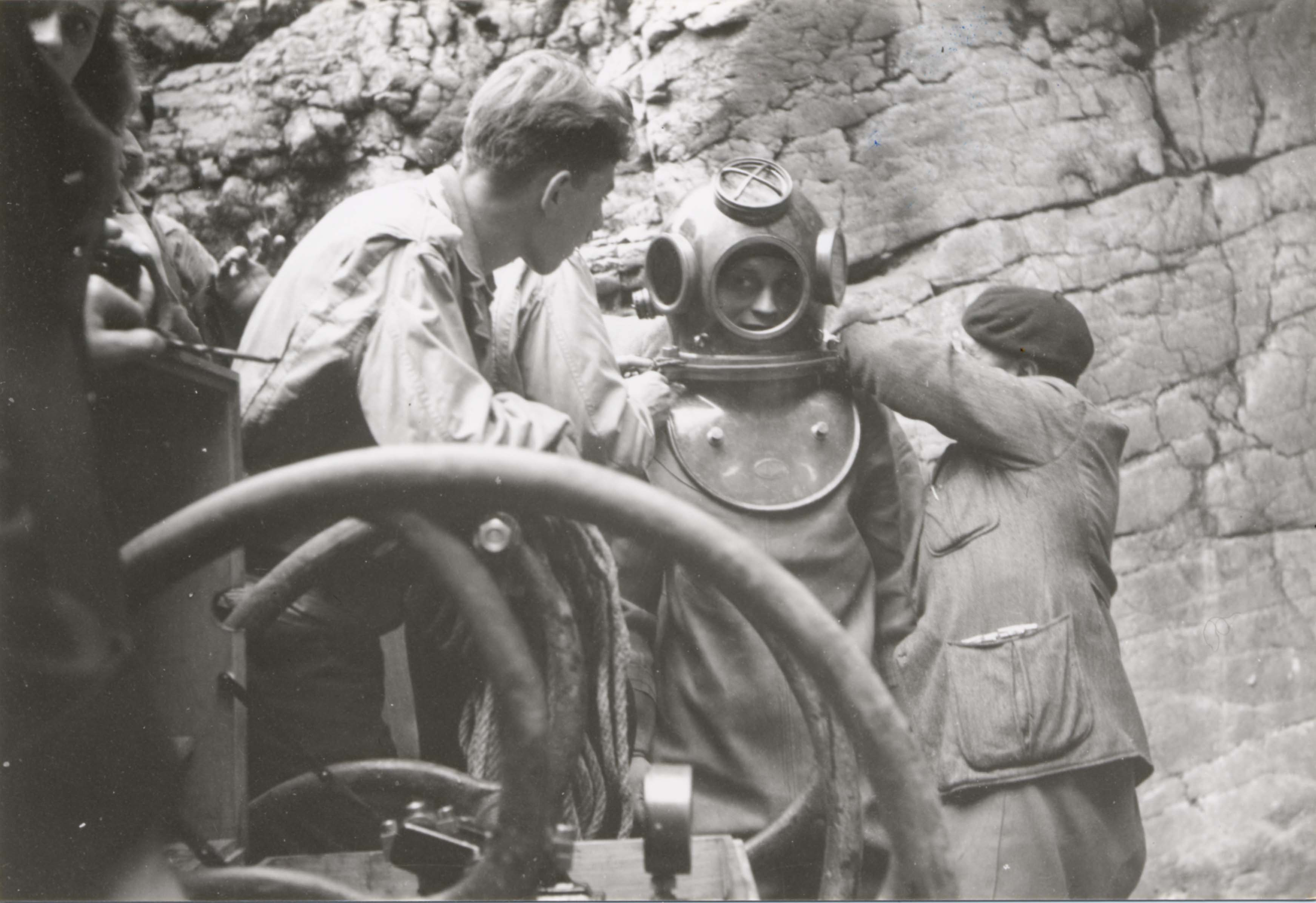 A la suite de Roger Pelletier, Jacques Collot descend dans le Frais-Puits de Quincey en scaphandre lourd le 26 mai 1946.